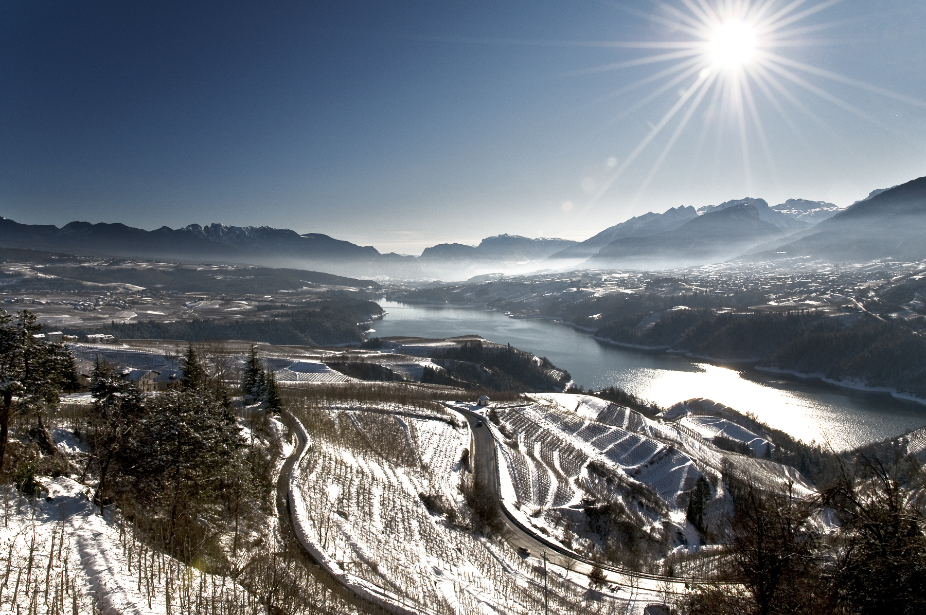 Veduta invernale del lago di Santa Giustina con l'abitato di Cles